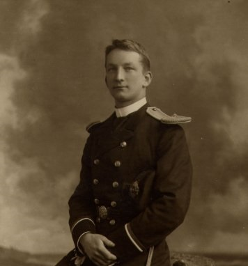 Реджинальд Ли — вперёдсмотрящий на «Титанике», во время службы во время службы в Королевском ВМФ Великобритании